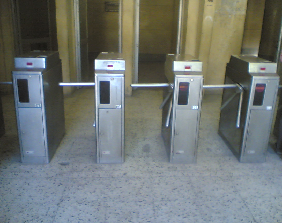 cairo merto